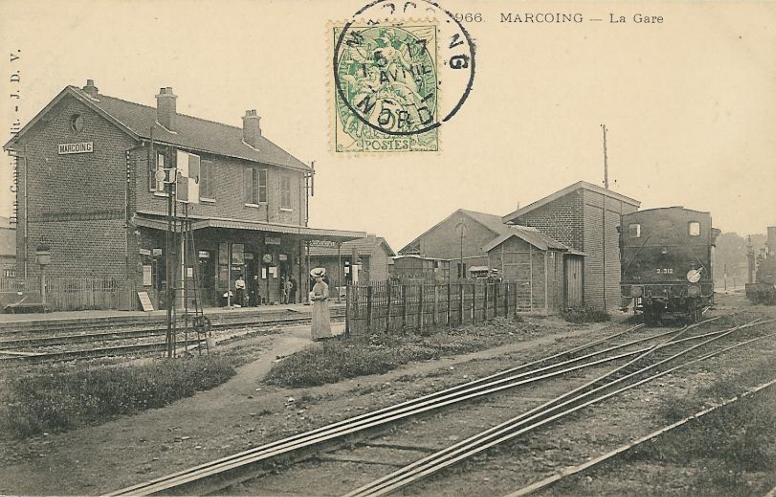 Gare de Marcoing, Nord, Nord-Pas-de-Calais, France.